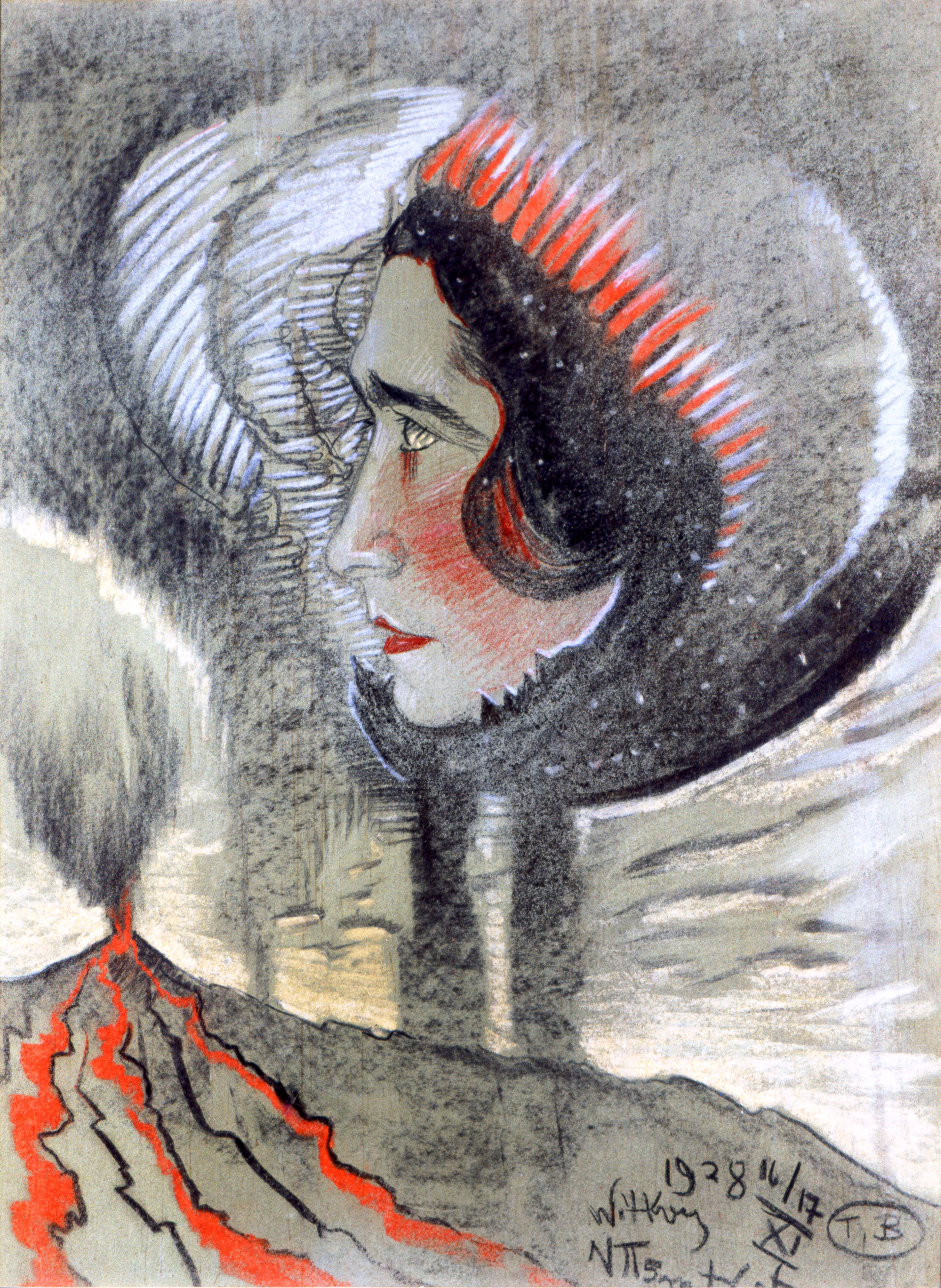 Portret Ireny Krzywickiej, pastel na papierze, 64 x 48 cm, Muzeum Pomorza Środkowego, Słupsk